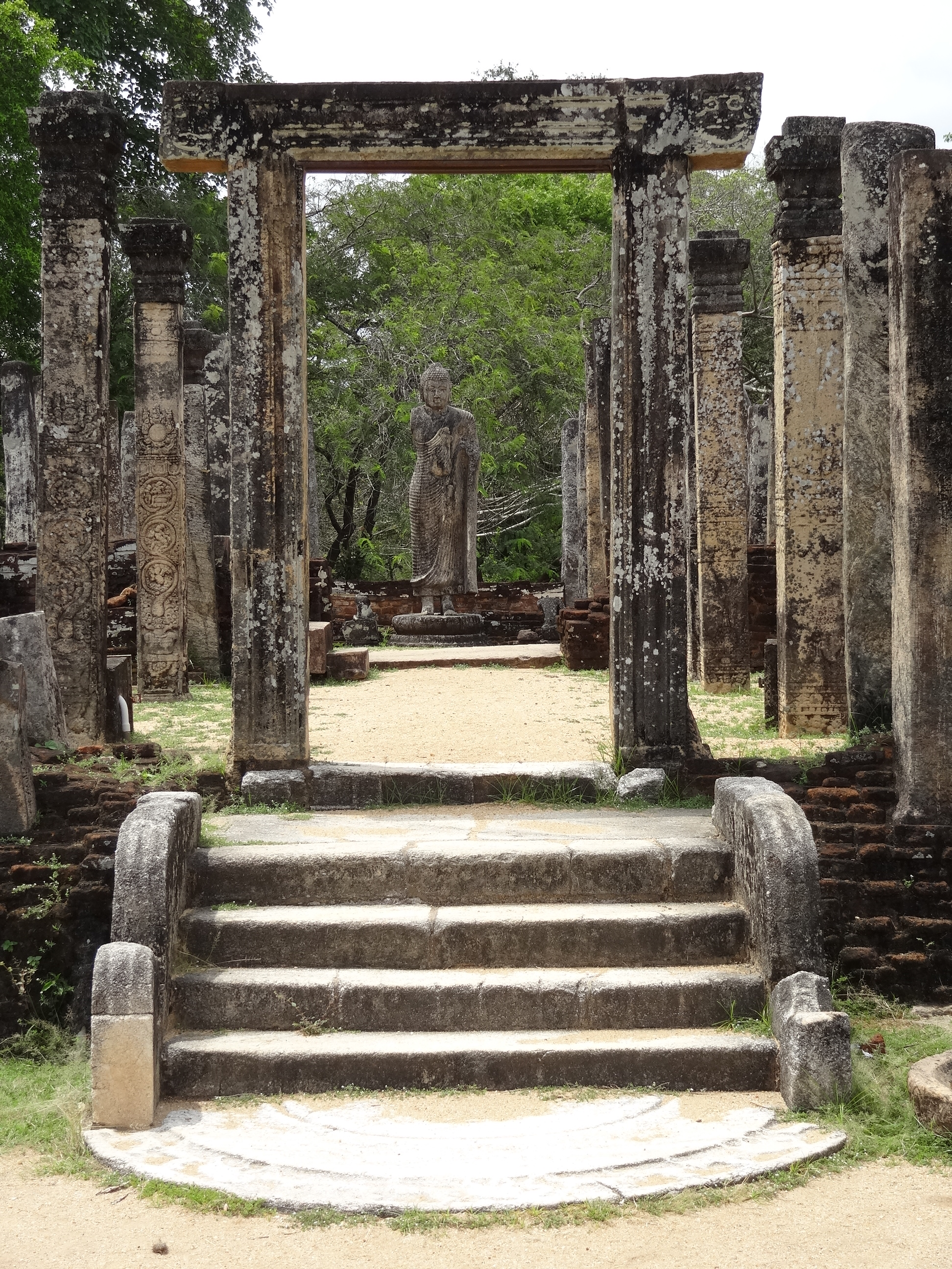 Atadage